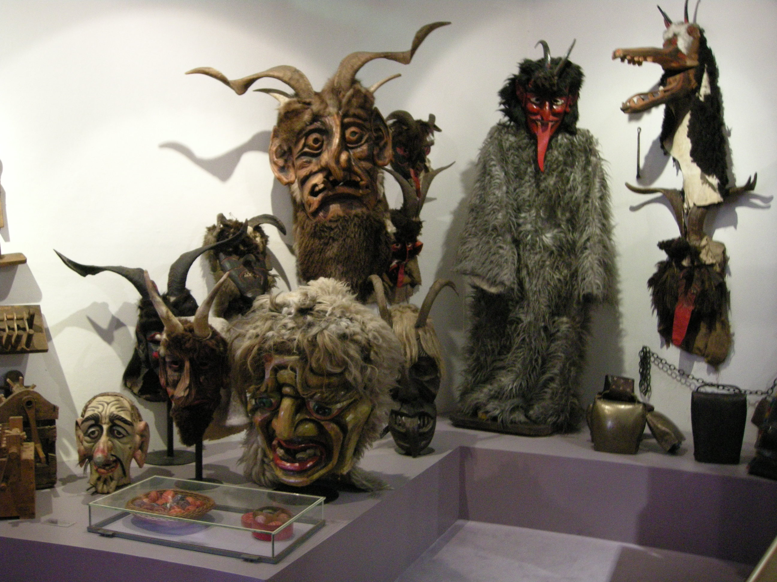 Spittal an der drau, schloss porcia, museo